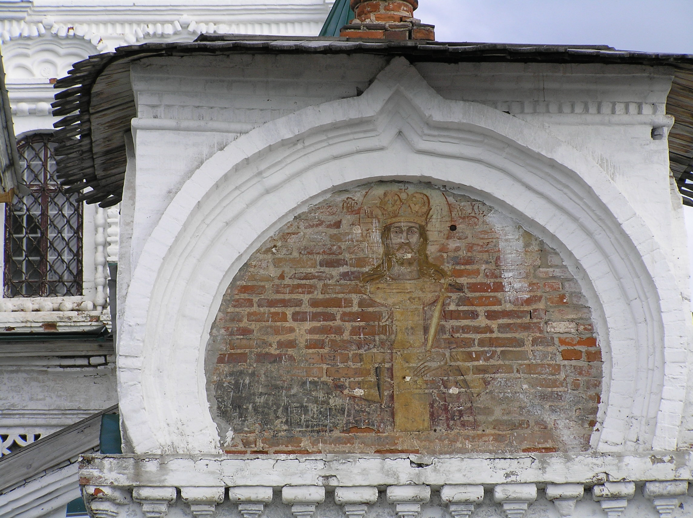 Фрагмент Троицкого Собора (г. Соликамск)